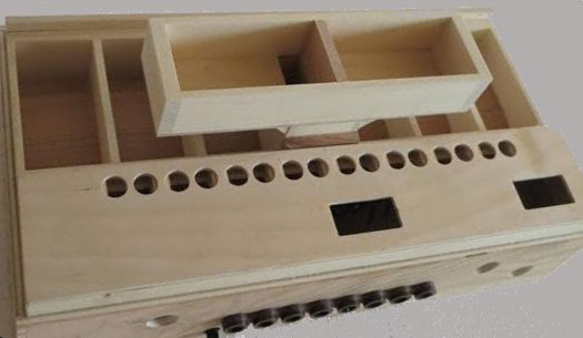 Stockwerkseinbau für zwei Zusätzliche Helikonbässe ansonsten traditionelle Anordnung der Einbauten.